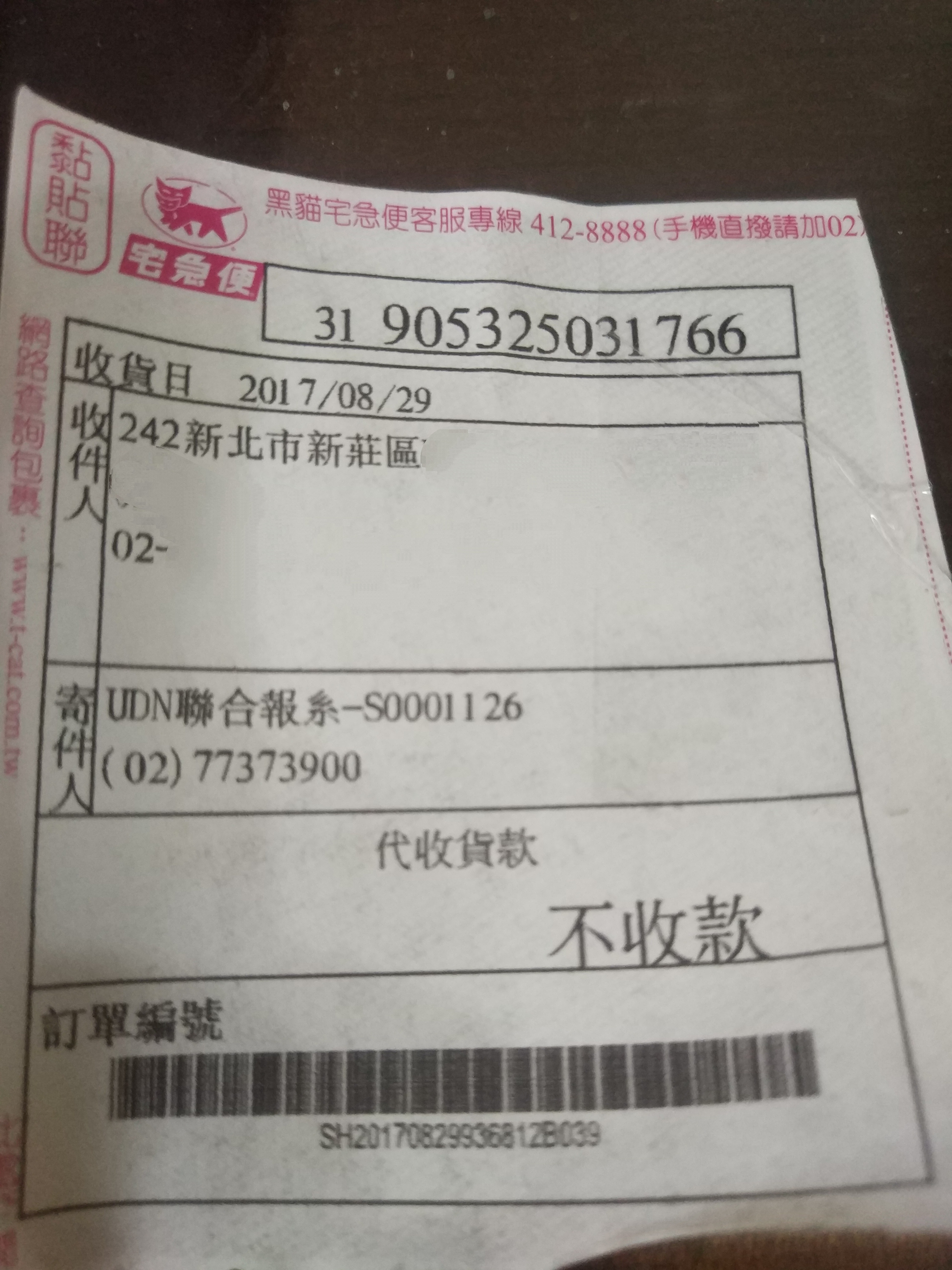 2017年從聯合報購物網站《udn買東西》寄出的統一速達配送單黏貼聯，收貨日期2017年8月29日。